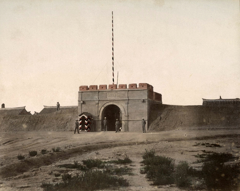 青岛清军骧武前营